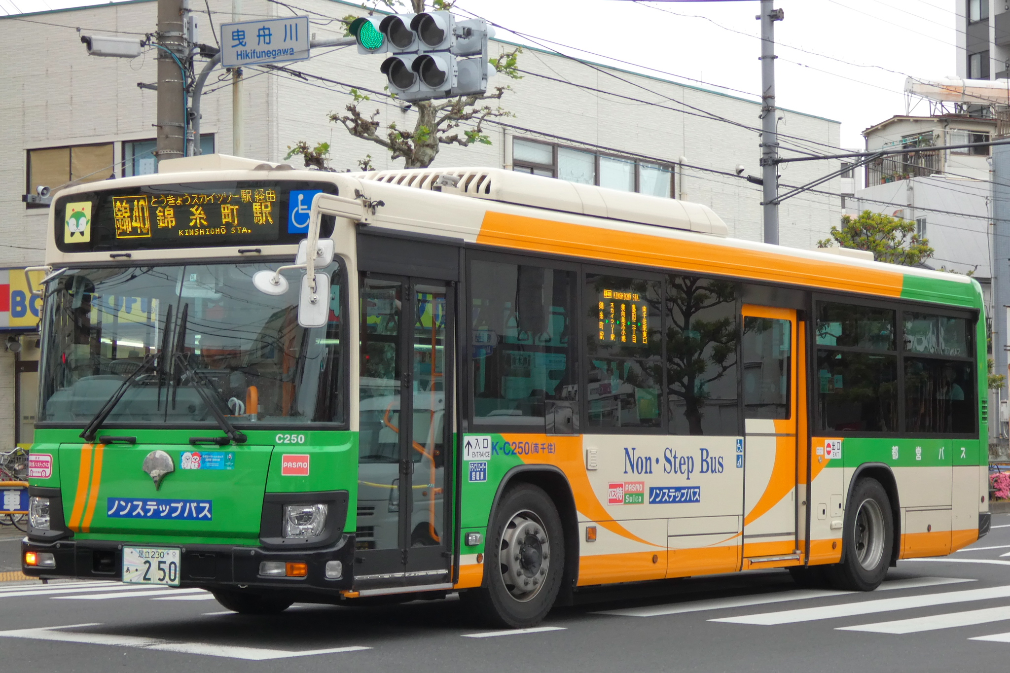 都営バス南千住営業所のいすゞ・エルガ(K-C250)